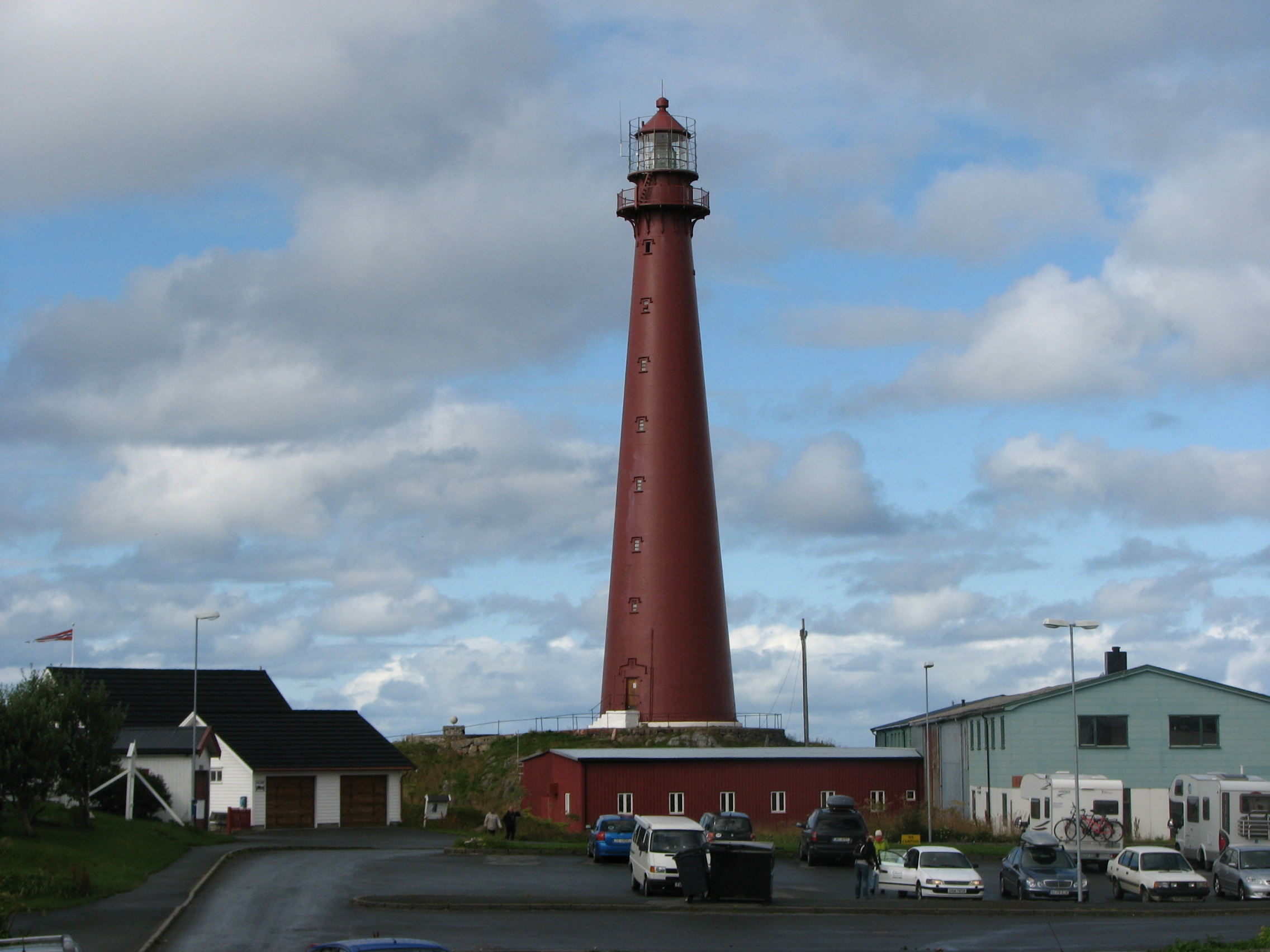 Andenes fyr